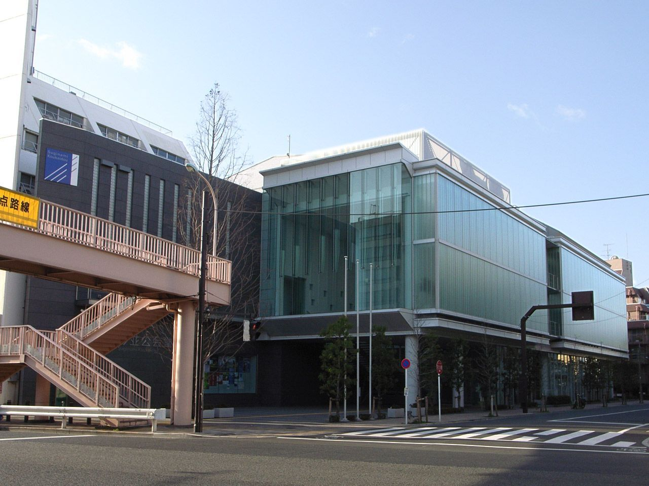 Suginami Public Hall, Suginami-ku, Tokyo, Japan / 杉並公会堂（東京都杉並区）